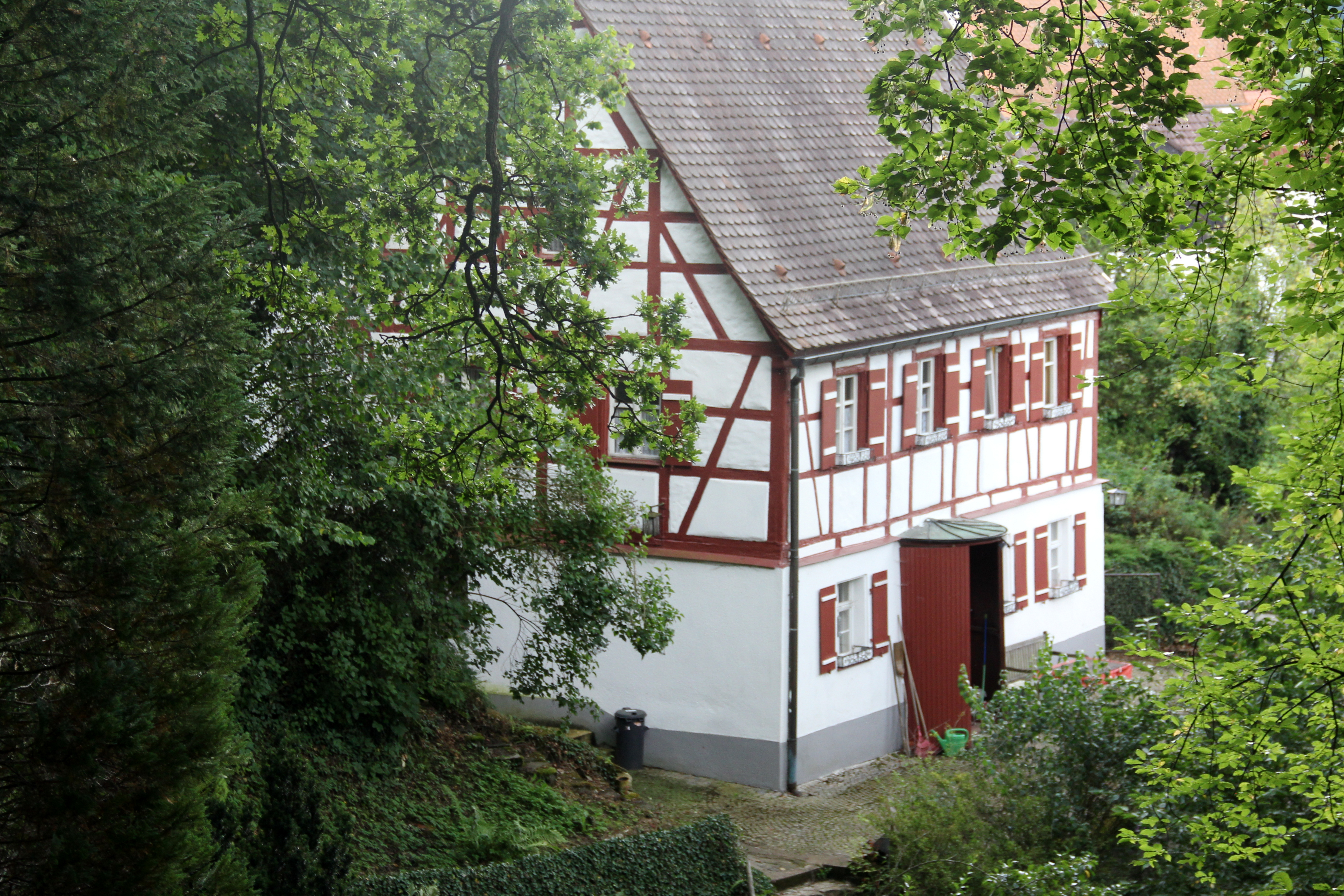 Haus in Vorra